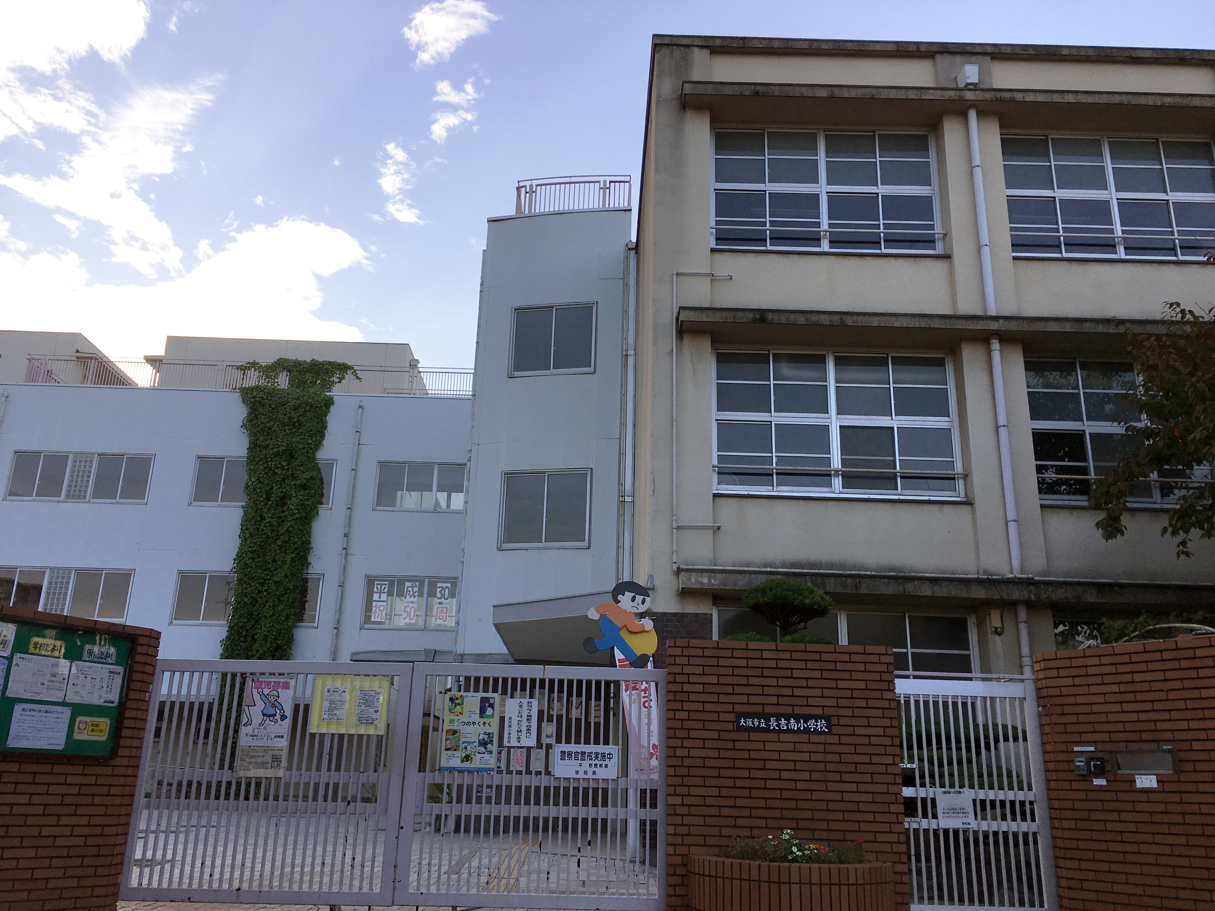 大阪市立長吉南小学校